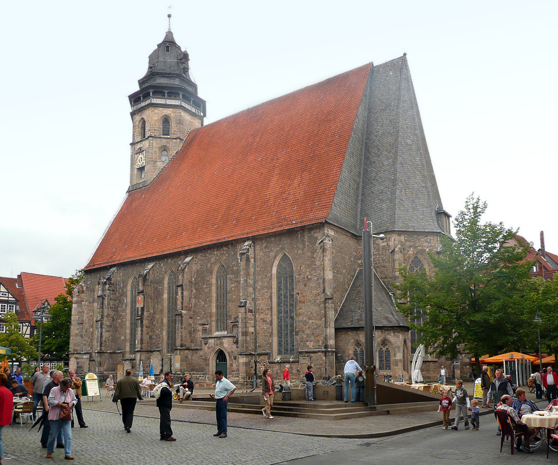 St. Blasius Kirche Hann. Münden